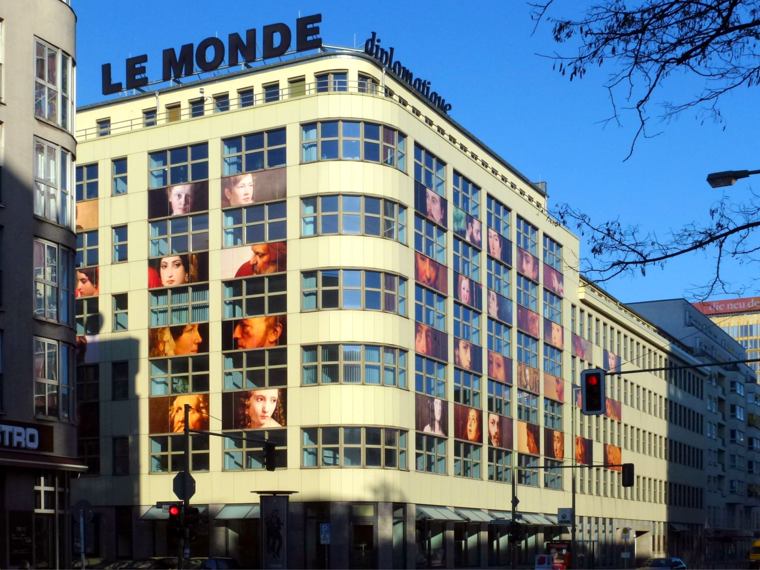 Gebäude der "Le Monde diplomatique" in Berlin-Kreuzberg; Rudi-Dutschke-Straße/Charlottenstraße